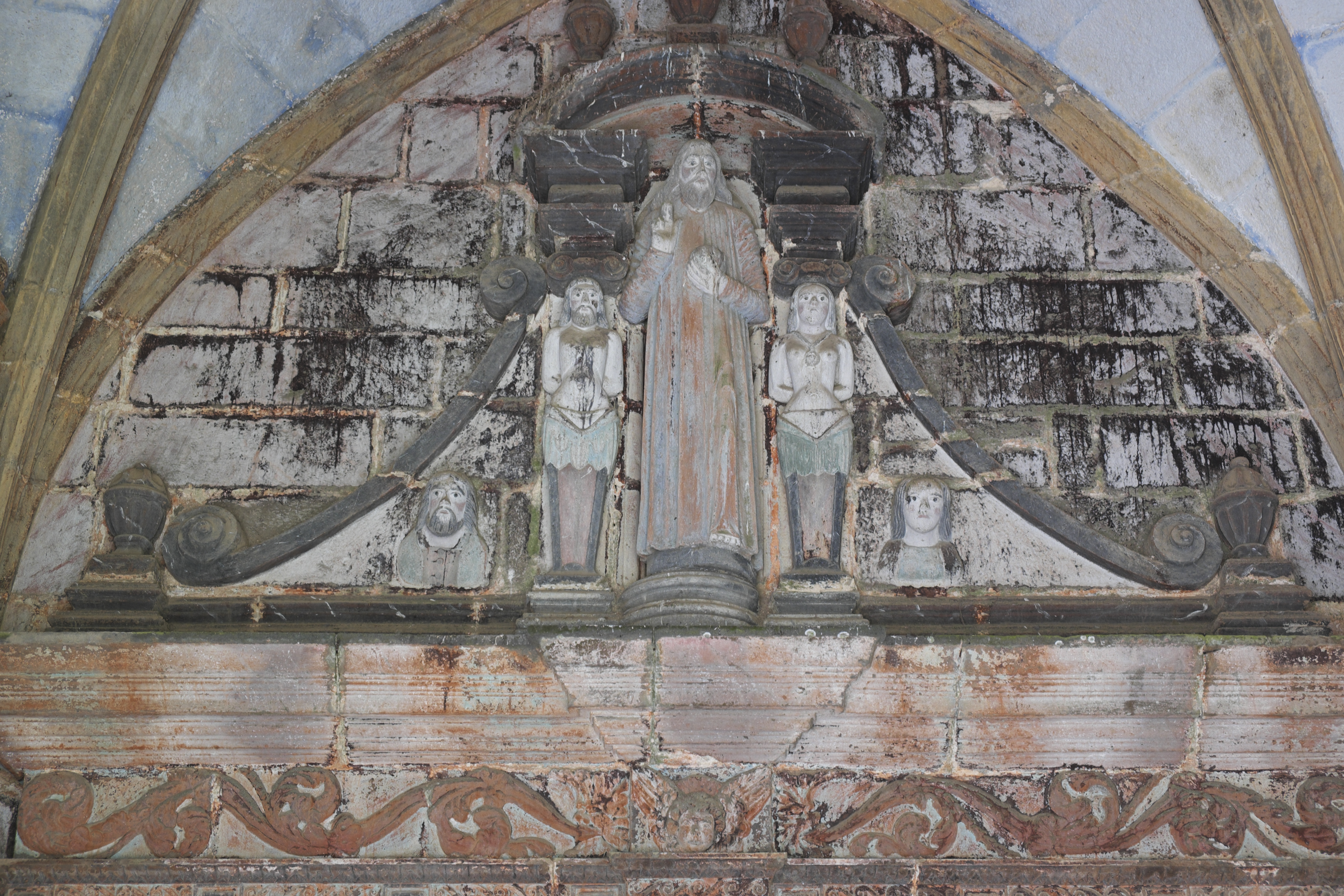 Katholische Pfarrkirche Saint-Miliau in Guimiliau im Département Finistère (Region Bretagne/Frankreich), südliche Vorhalle, Figuren über dem inneren Portal